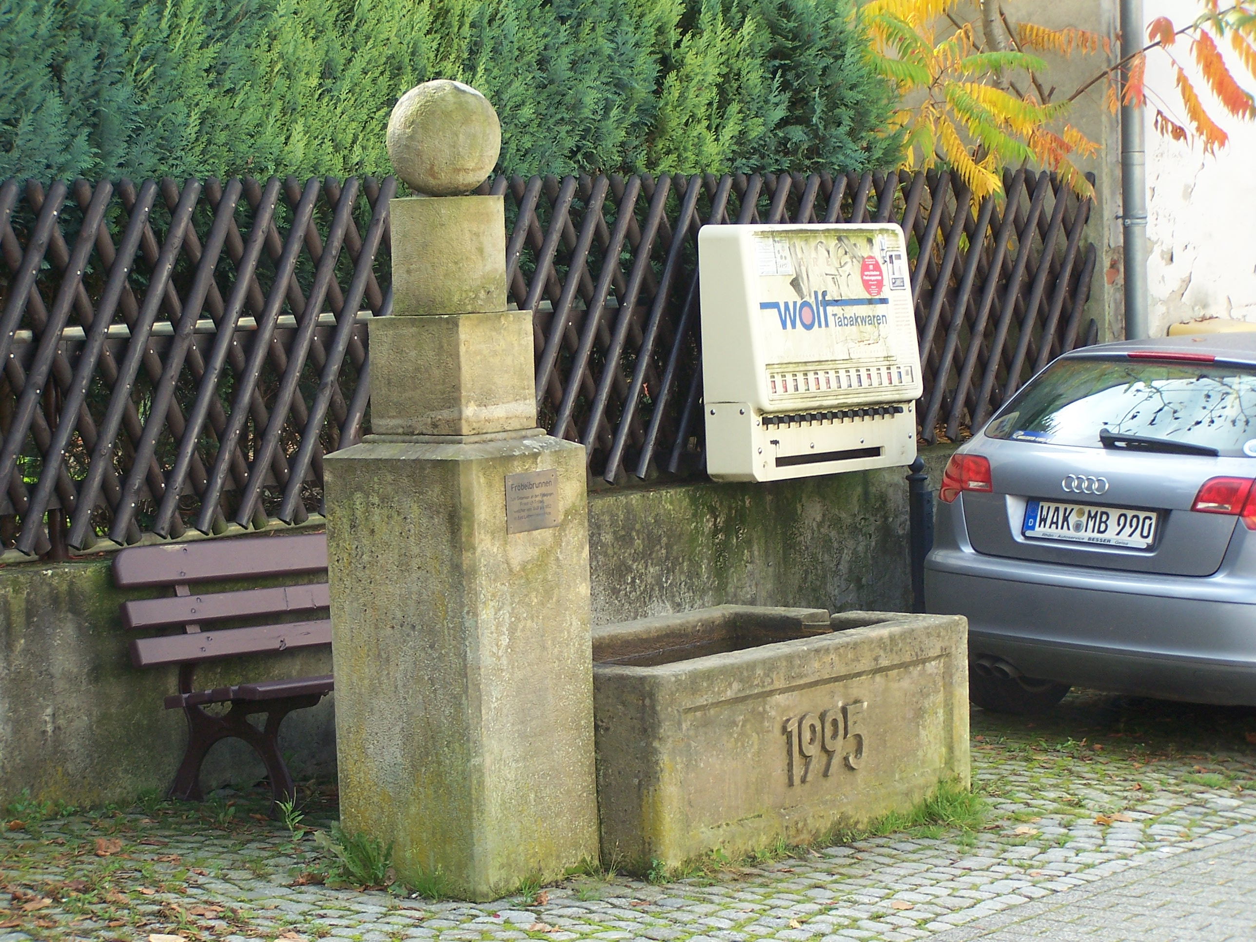 Bad Liebenstein, Der Fröbelbrunnen - erbaut 1995 nach Motiven des von Fröbel empfohlenen Kinderspielzeugs